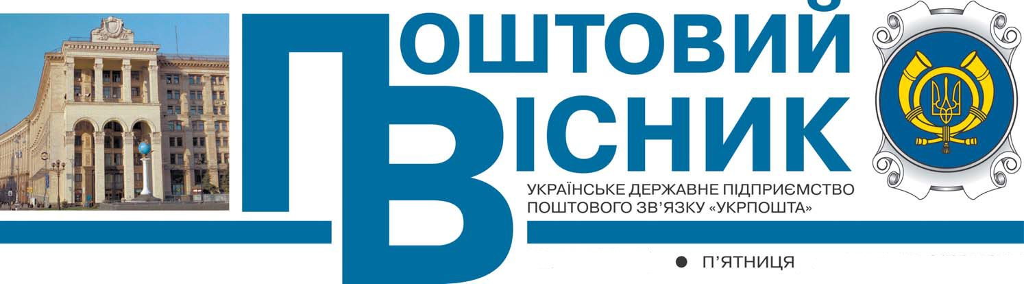 Зображення з першої сторінки корпоративного видання УДППЗ "Укрпошта"